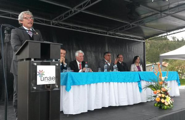 Inauguración de Carreras de la UNAE